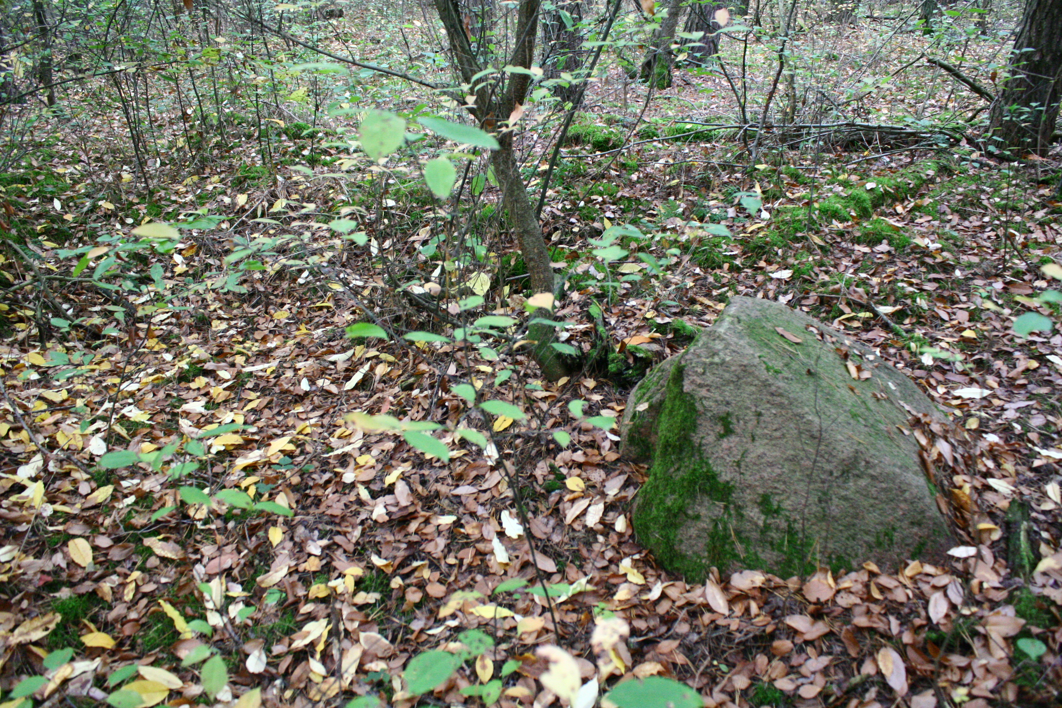 Großsteingrab Haldensleben II 14